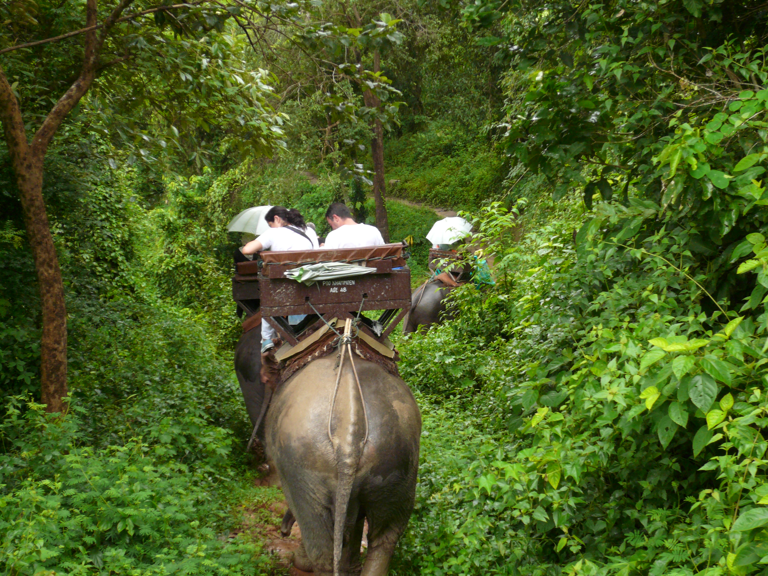 Paseando por la selva en elefante